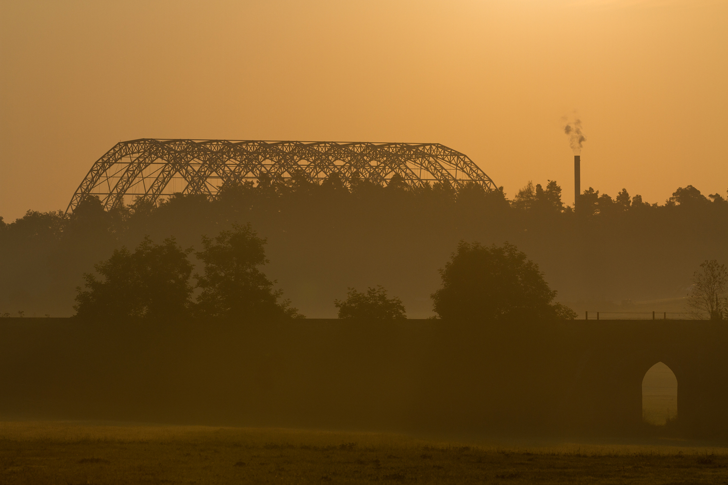 Die Sondermülldeponie in Bonfol (JU) während der Sanierungsphase.